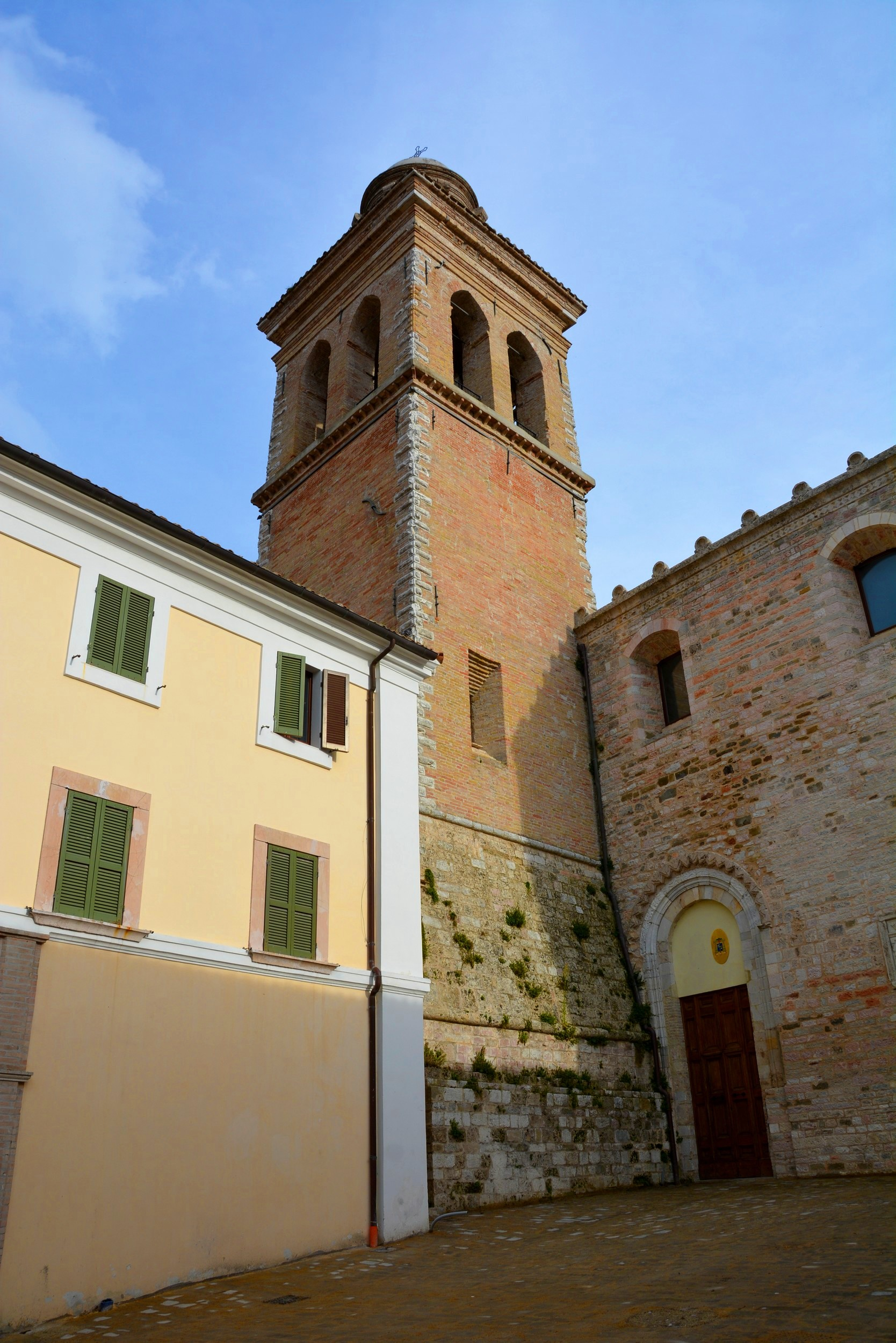 Torre campanaria del Duomo This is a photo of a monument which is part of cultural heritage of Italy.